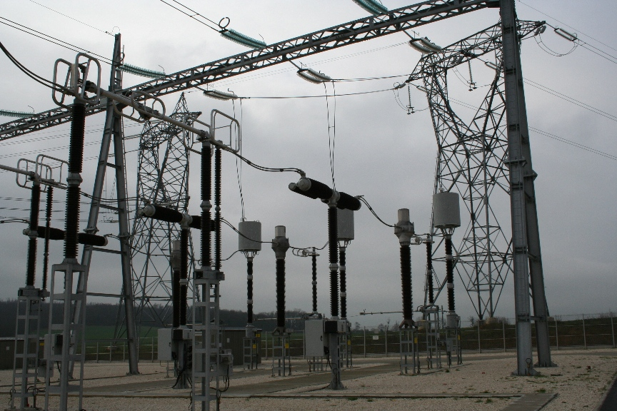 Het onderstation Penchard is een 400 kV onderstation dat de hogesnelheidslijn nabij Parijs voedt. Duidelijk zichtbaar zijn de communicatiespoelen, de stroomtransformatoren, de vermogenschakelaars en de scheidingsschakelaars.